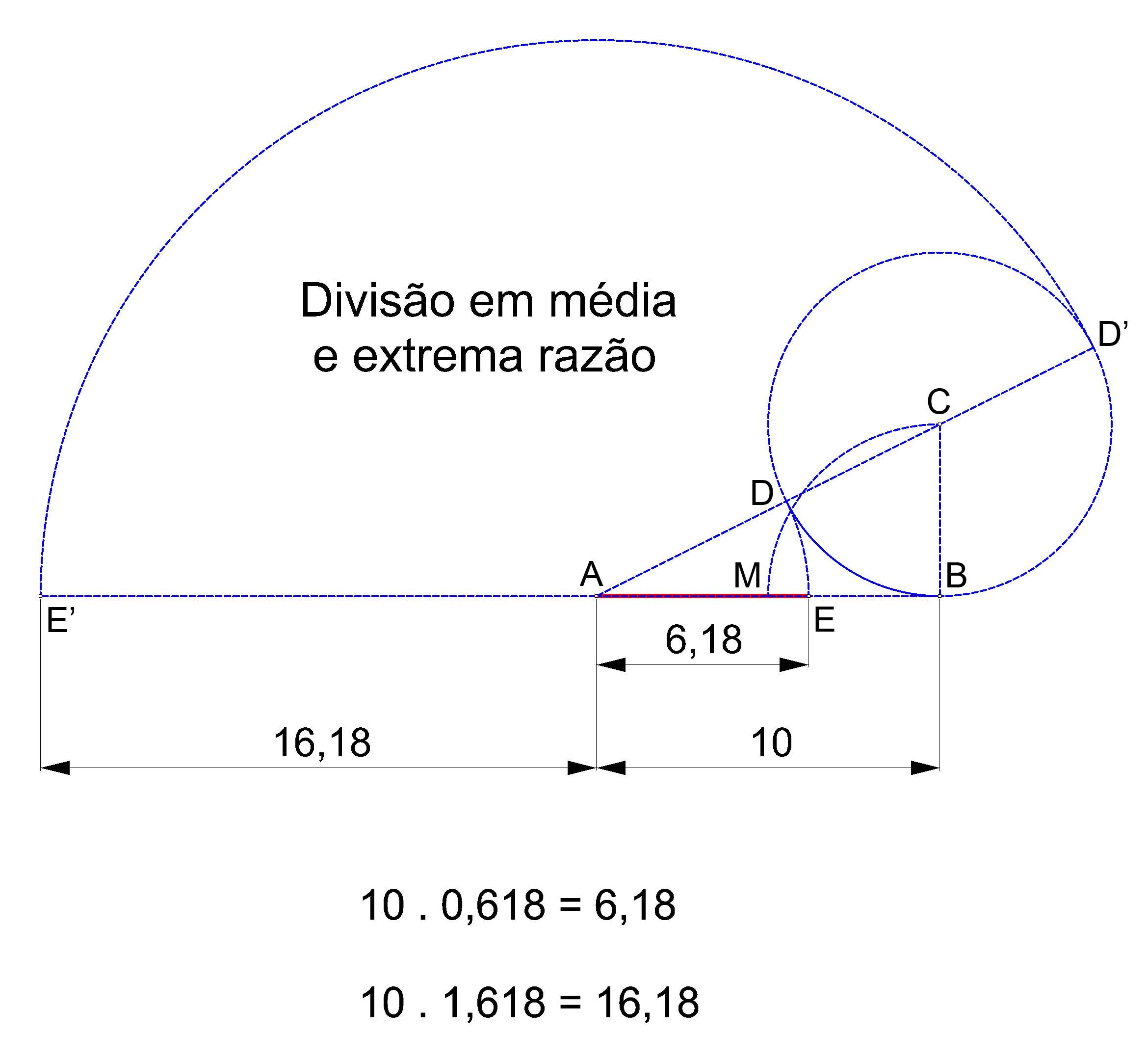 Desenho Geométrico: Divisão em média e extrema razão (Euclides, geômetra grego)